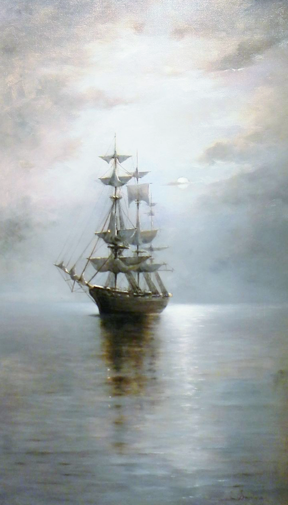 Oleo sobre tela, Velero de Enrique Swinburn Kirk, nació en Santiago de Chile, el 2 de octubre de 1859, y falleció en la misma ciudad el 22 de octubre de 1929. Fue un pintor, dibujante y cronista chileno